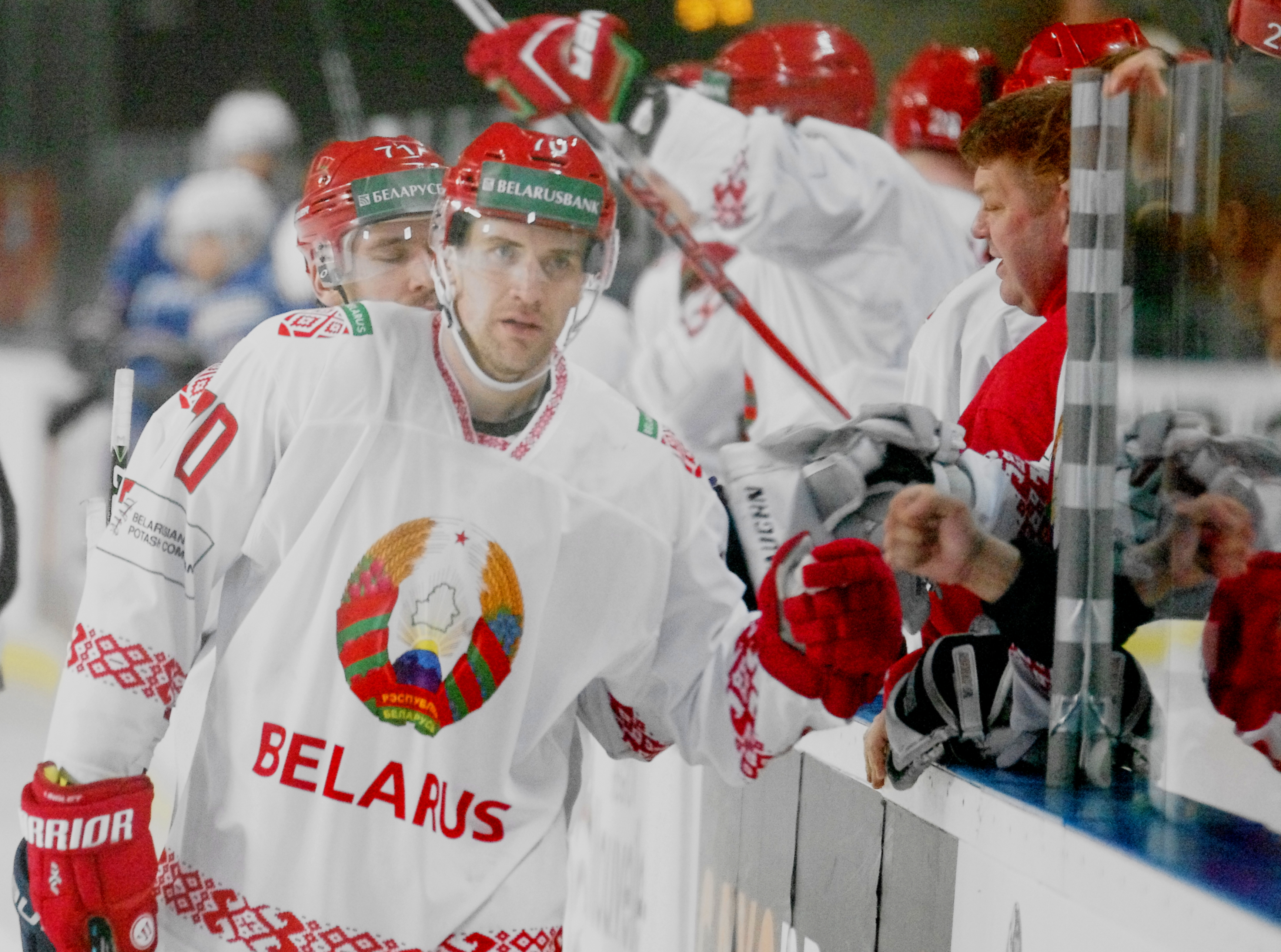 France vs. Biélorussie, 1er mai 2017